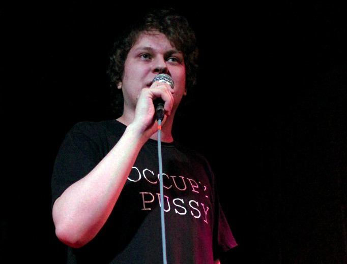 Живое выступление 2014 года в Нижнем Новгороде